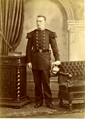 Emmanuel de Mac Mahon, général français (1859-1930)